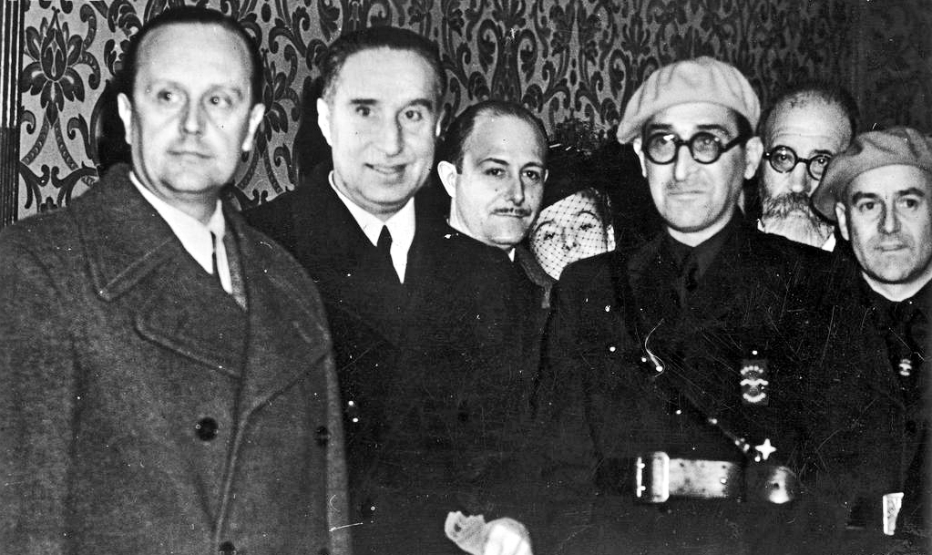 Parte de la comitiva española que asistió a la coronación del papa Pío XII. Roma, marzo de 1939. En primer plano aparecen los políticos franquistas Raimundo Fernández-Cuesta y José de Yanguas Messía, y el poeta Rafael Sánchez Mazas.